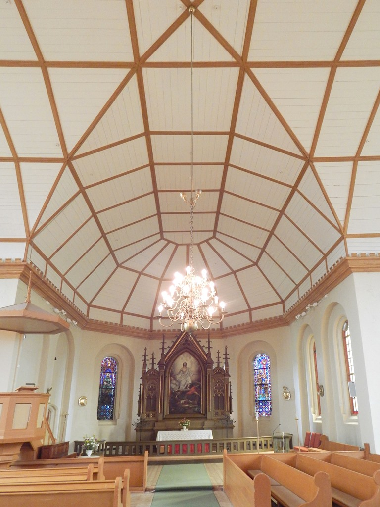 Interiør i Strøm kirke i Sør-Odal